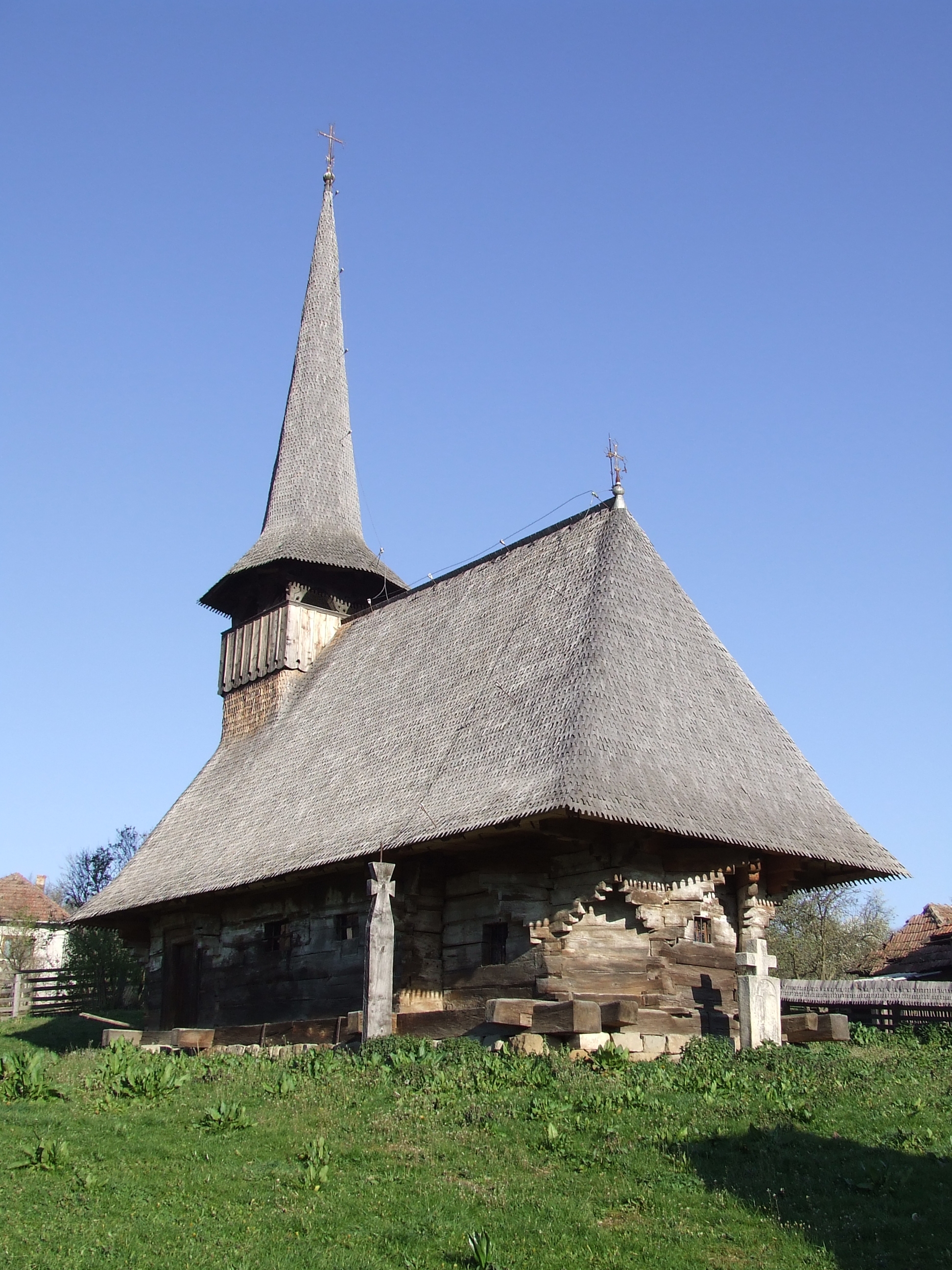 Biserica de lemn din Baica